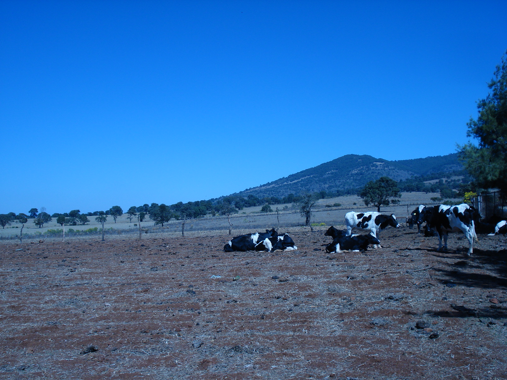 Vista hacia el norte en donde se pueden apreciar unas vacas descanzando y al fondo el cerro de San Francisco